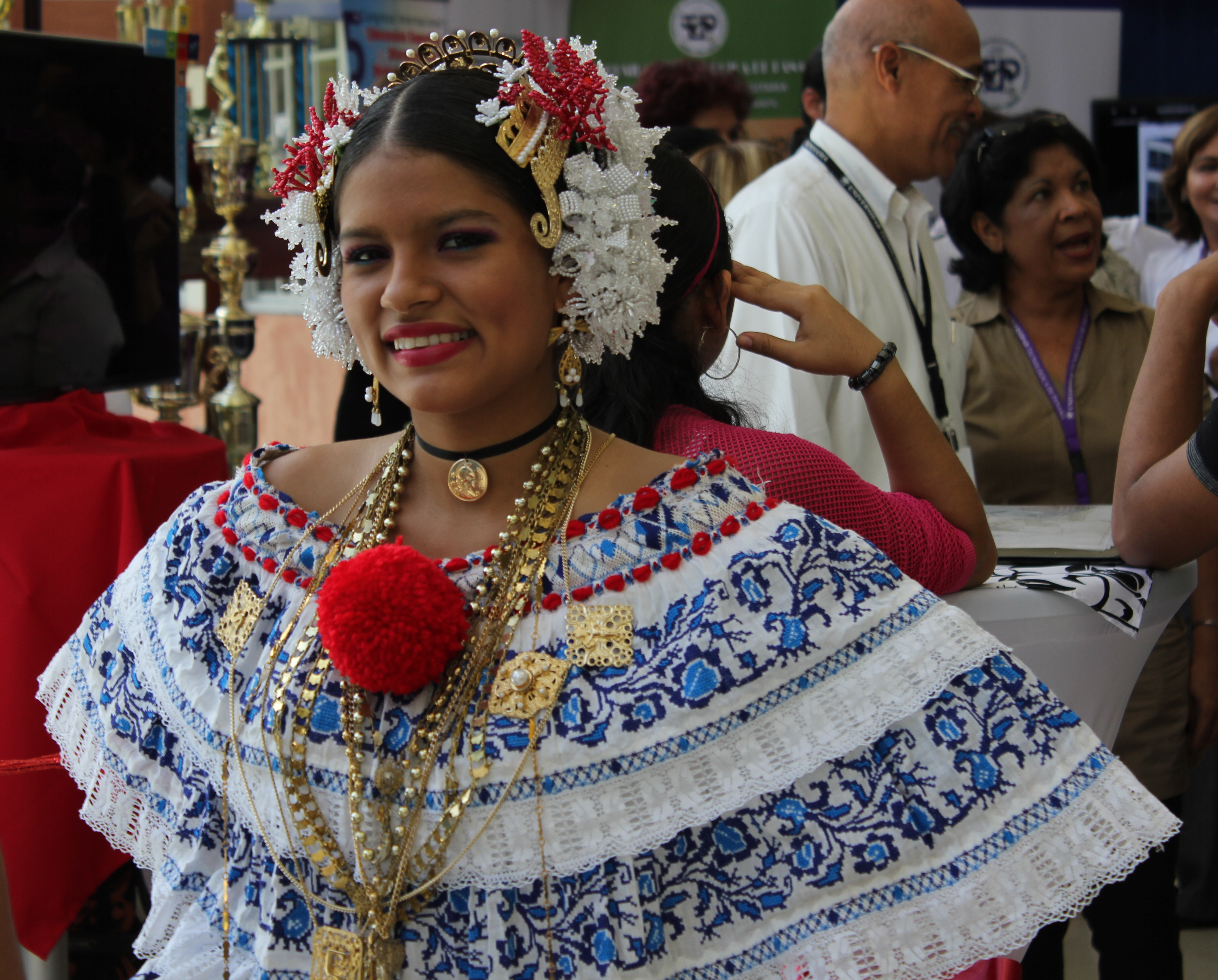 La Pollera: traje típico de Panamá, bordada con la técnica del marcado en color azul.